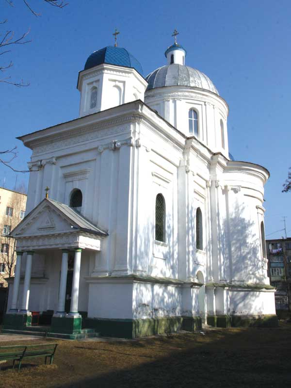 Георгіївська церква, Могилів-Подільський, вул. Грецька,8